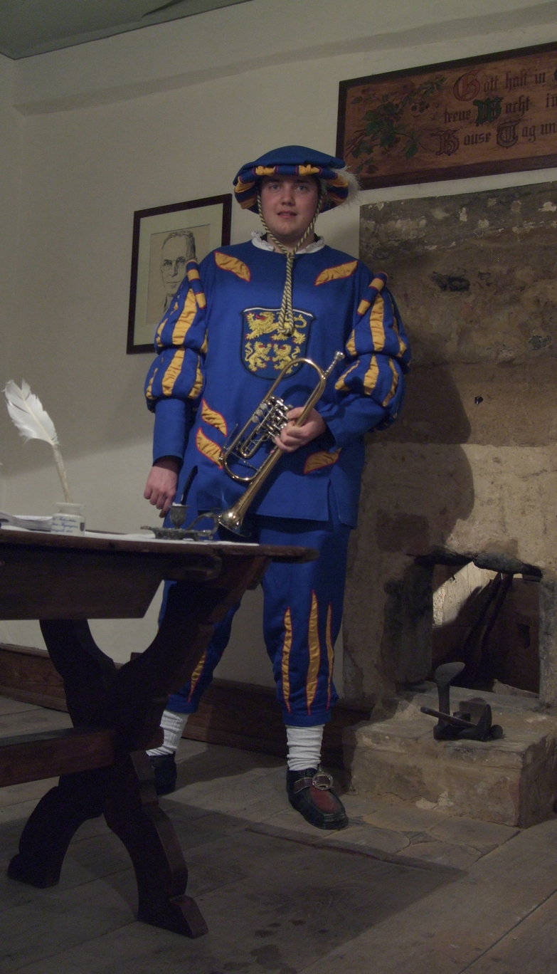 Türmer Dennis Willershausen; Stadtkirche St. Marien in Homberg (Efze)